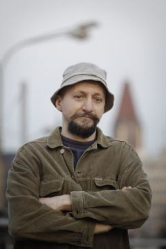 Zdjęcie Gabriela Leonarda Kamińskiego wykonane przez Małgosię Ostrowską na kładce dla pieszych nad ul. Legnicką we Wrocławiu